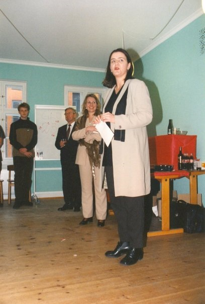 Ved Gymnasieelevernes Landsorganisations (GLOs) 25 års jubilæumsreception i 1999 talte bl.a. undervisningsminister Margrethe Vestager (i forgrunden). Derudover ses på billedet fra venstre mod højre: Simon Grundtvig Christensen (formand Danske Gymnasieelevers Sammenslutning, DGS), Ole Vig Jensen (tidligere undervisningsminister) og Kirstine Vestergård Nielsen (formand for GLO).